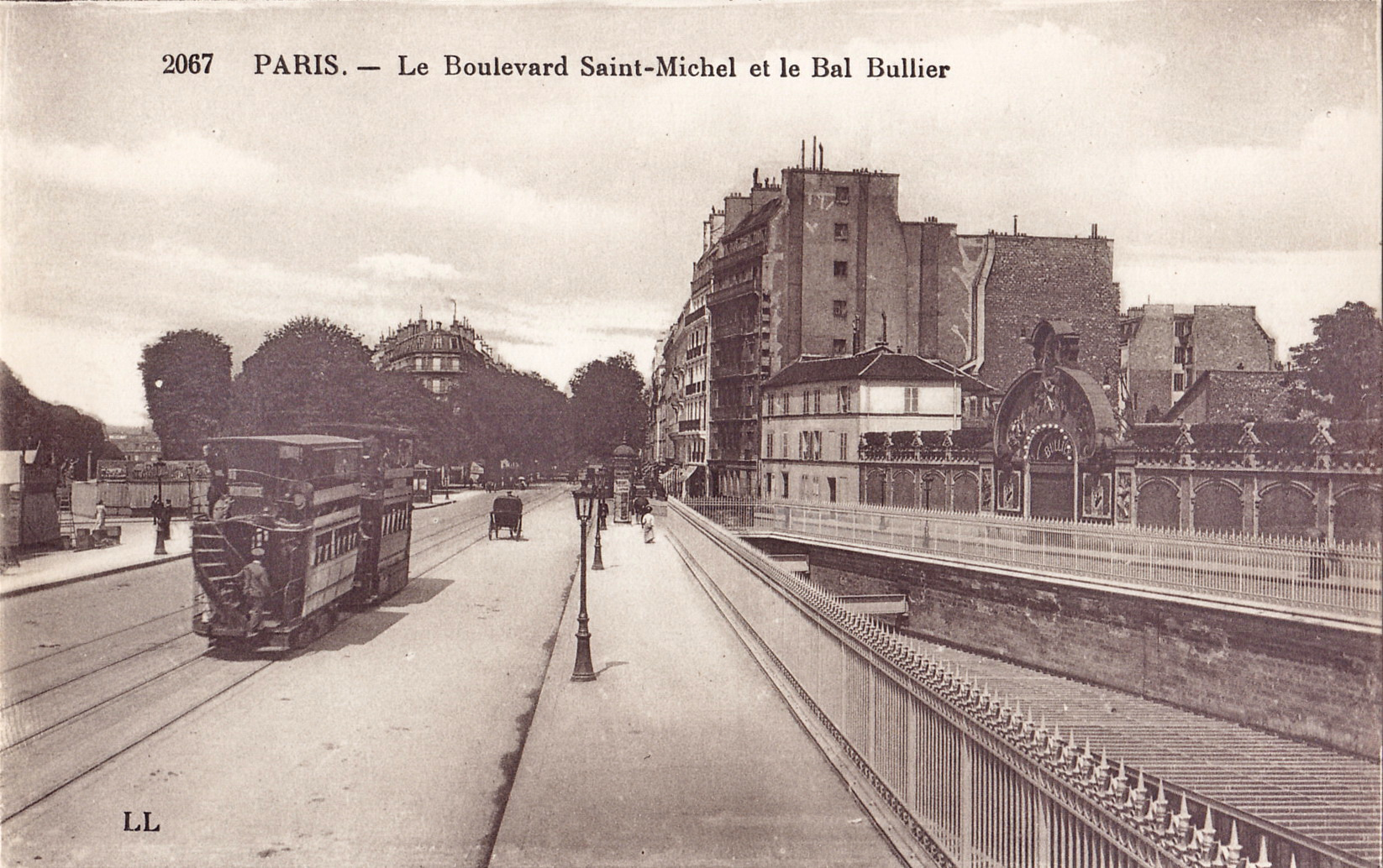 Carte postale ancienne éditée par LL, n°2067 :PARIS